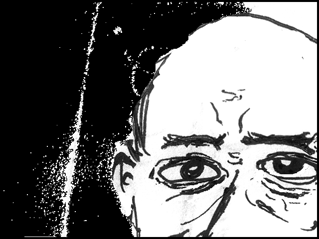 Schoenberg